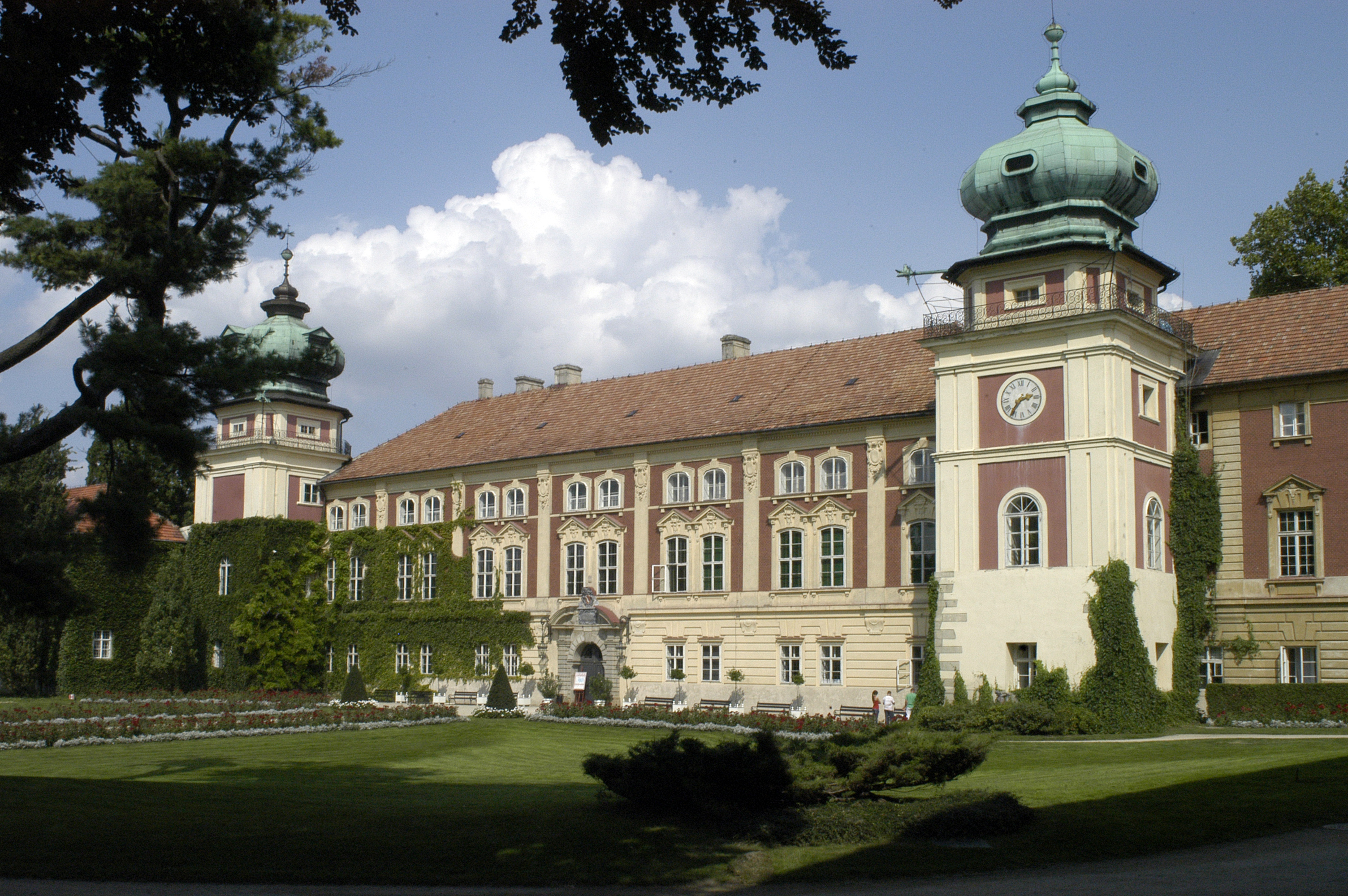 Łańcut - zamek